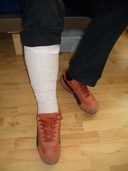 Kompressionswickelung mit darüberliegendem Schlauchverband, alltagstauglich